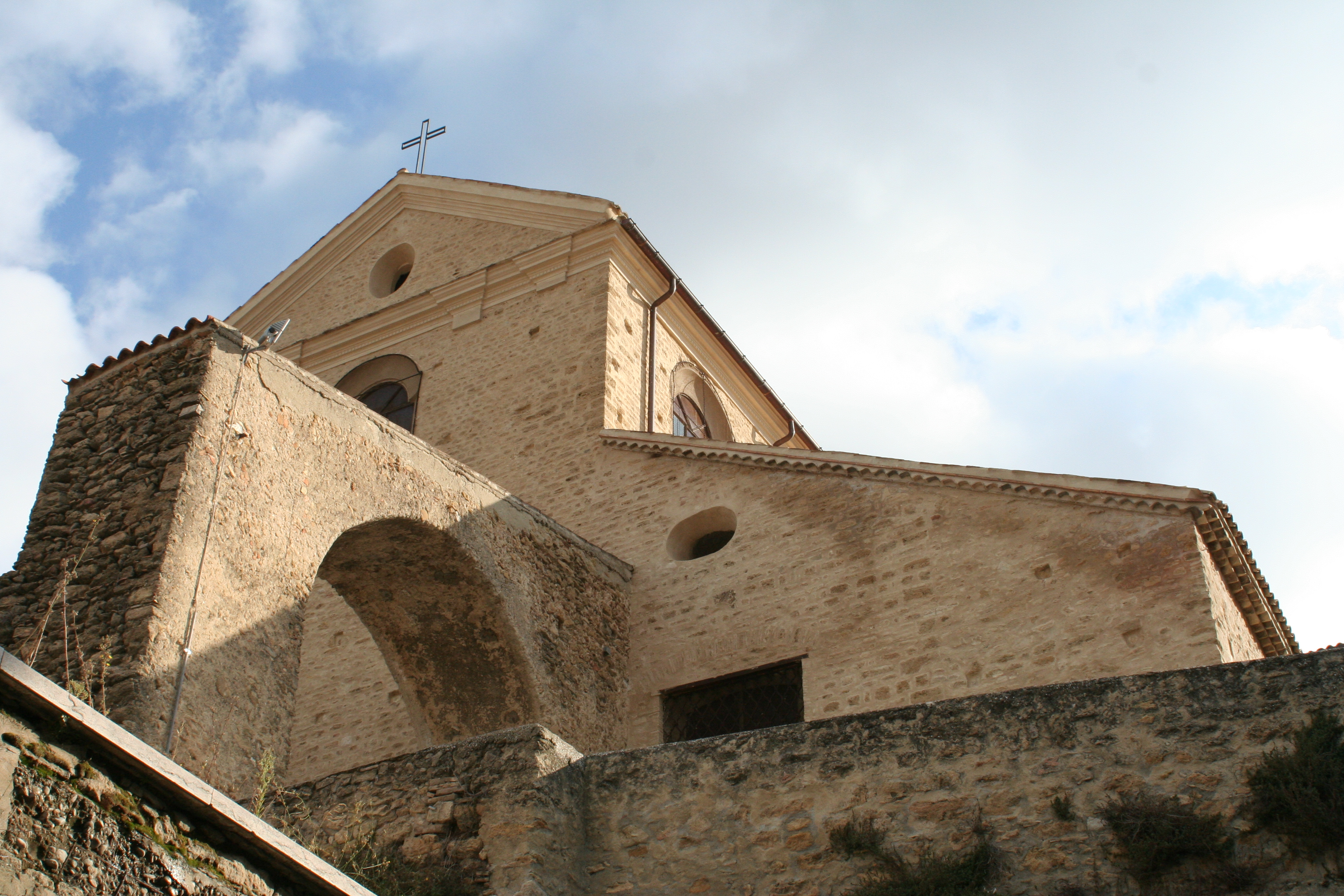 Autore: Rocco Stasi. Fonte: Fatta da me. Cattedrale di Tricarico vista dalla via Fontana. Licenza d'uso: GFDL, sono l'autore.